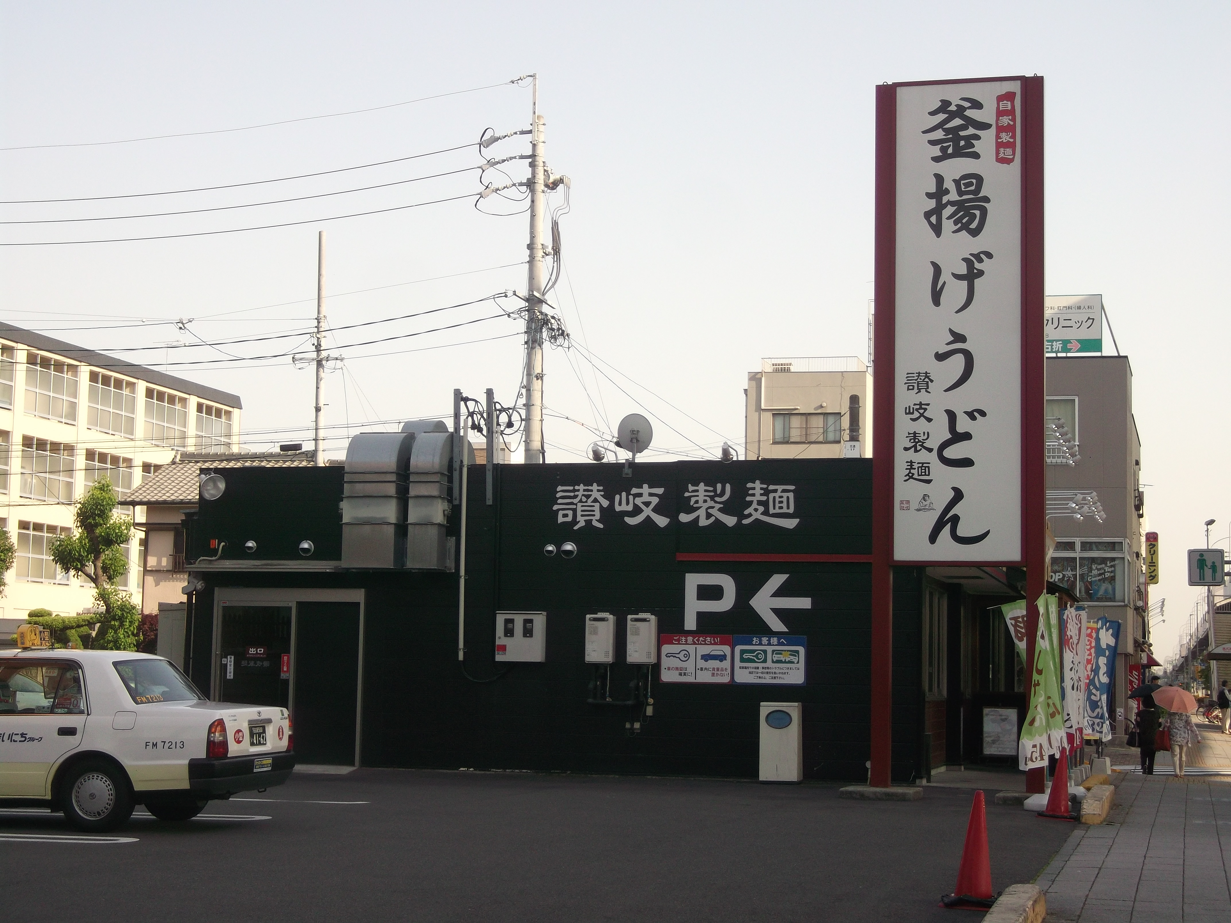 名古屋市北区成願寺の讃岐製麺中切店を西側公道（国道41号）北側より写す